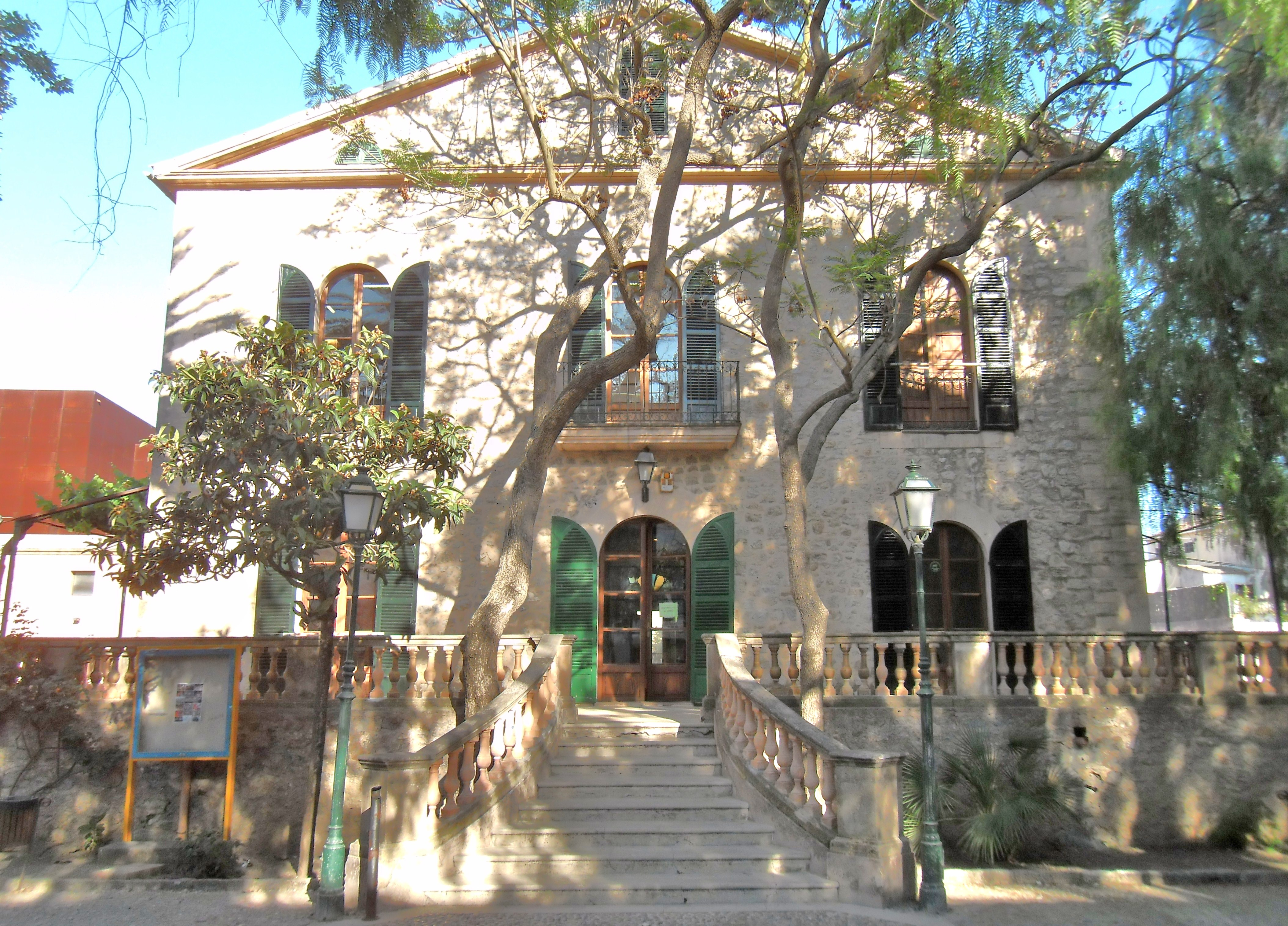 Herrenhaus Na Batlessa in Arta, Mallorca; heute Stadtbibliothek mit Ausstellungsräumen